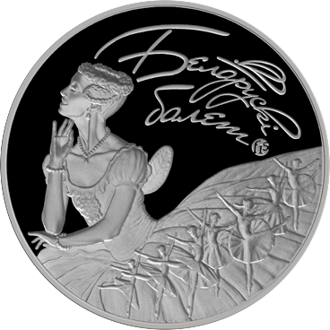 Памятная монета Белоруссии